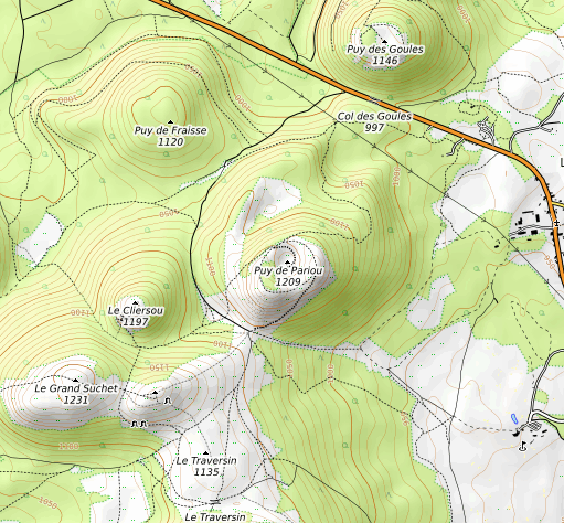 carte réalisée sur umap This map may be incomplete, and may contain errors. Don't rely solely on it for navigation.